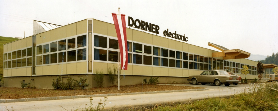 Firmengebäude im Jahr 1977